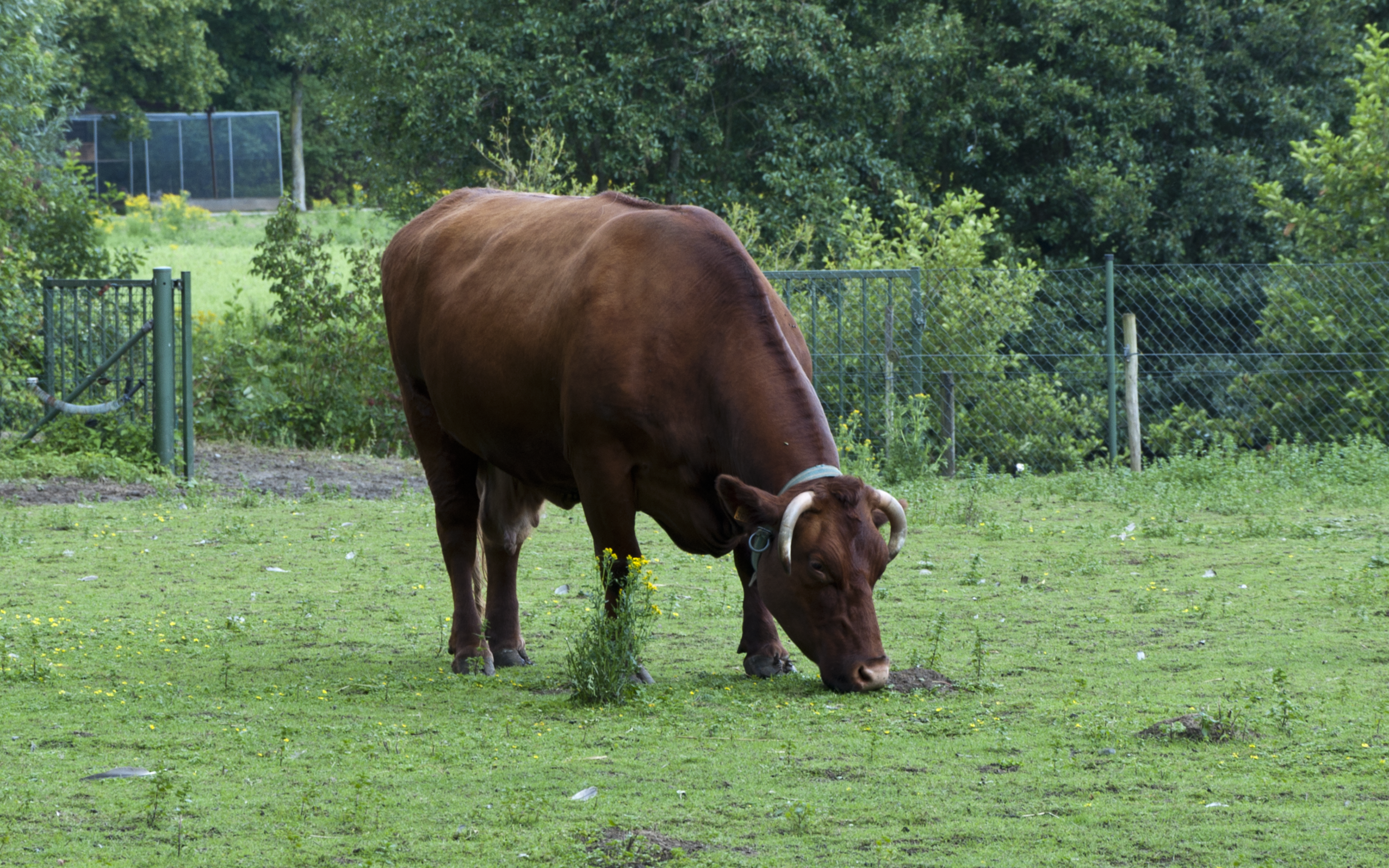 West-Vlaams rood, in Puyenbroeck, te Wachtebeke, België